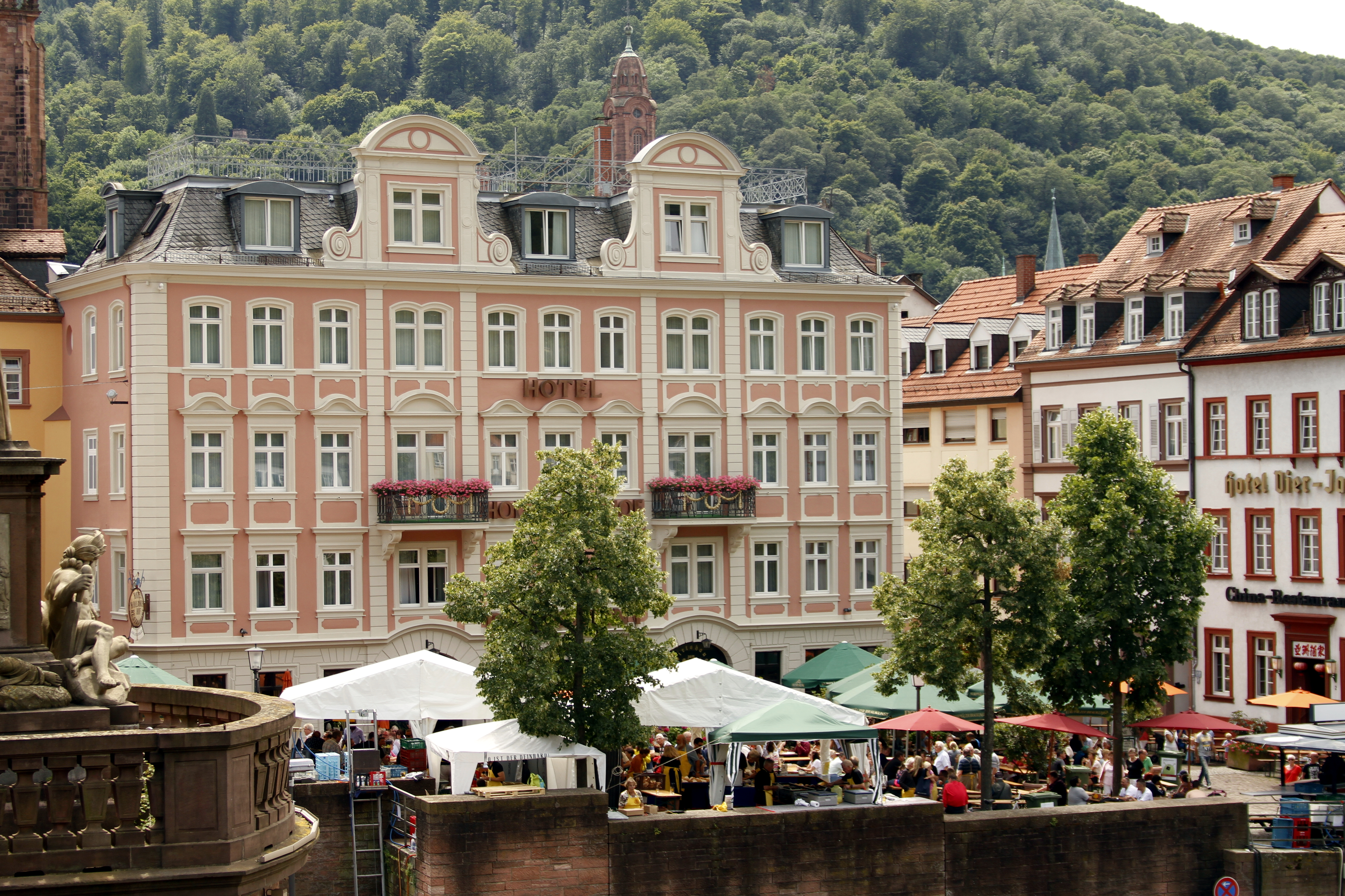 Hotel Holländer Hof - Heidelberg - Germany